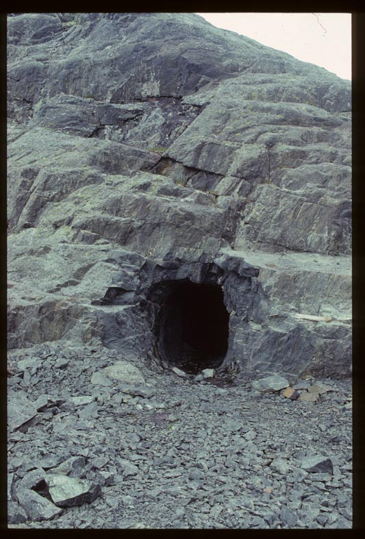 Jukkasjärvi 2159. Gruvområde. Motiv: Jukkasjärvi 2159 Kategori: Gruvområde Jukkasjärvi 2159. Gruvområde. Jukkasjärvi 2159.